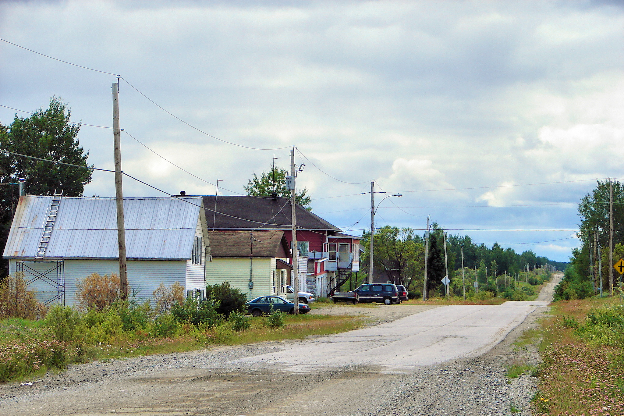 Despinassy, Quebec, Canada